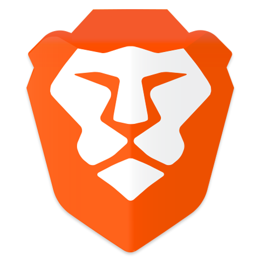 braveのアプリアイコン